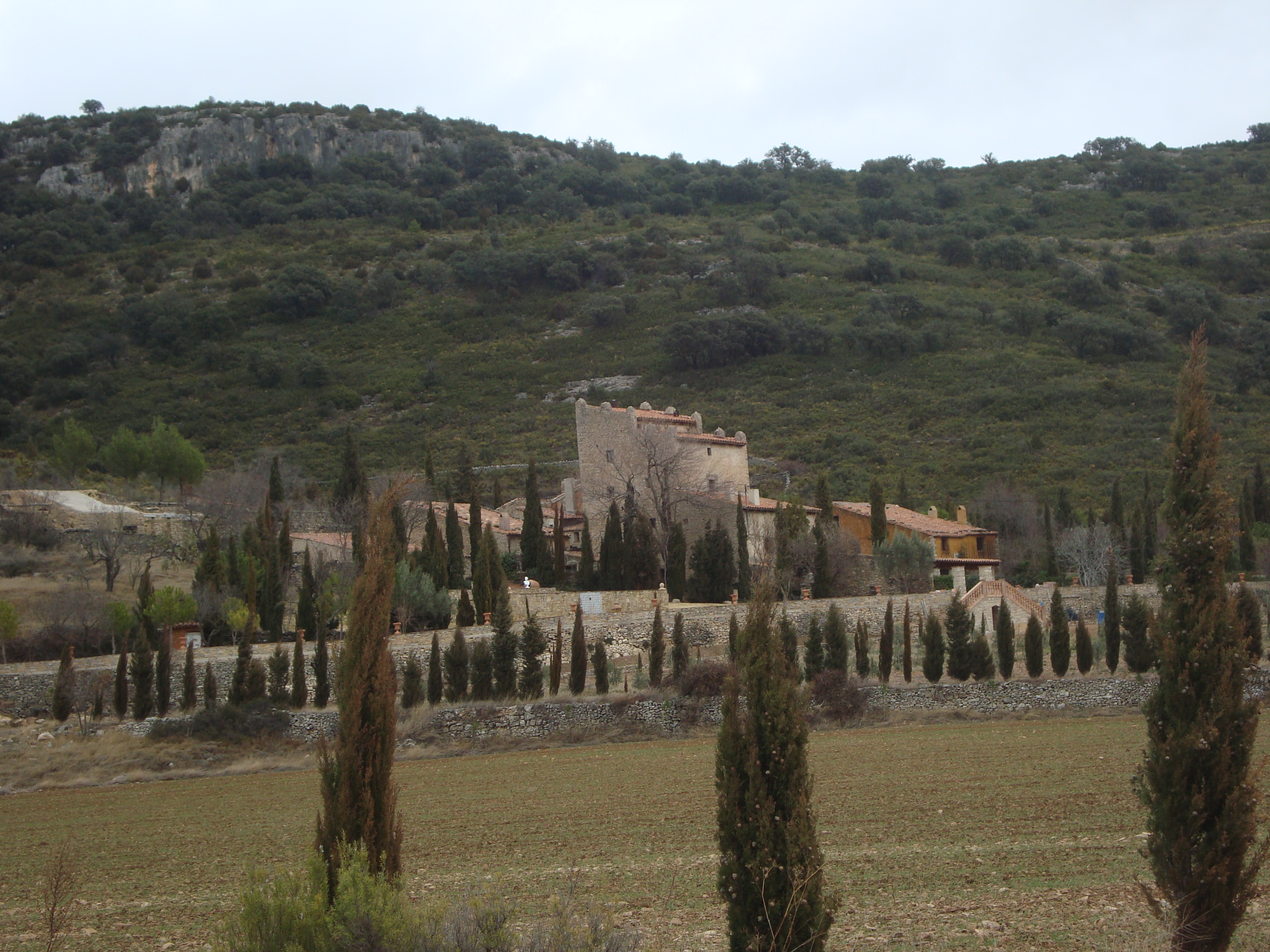 Masia fortificada de Torre Beltráns, Ares del Maestrat